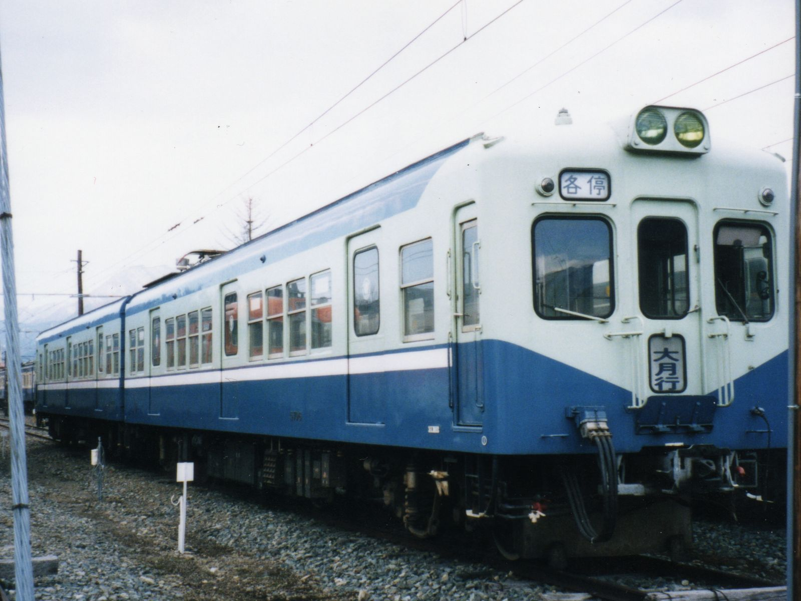 Fujikyuko Co., EMU type 5700 from Odakyu 2300 at Kawaguchiko Sta.